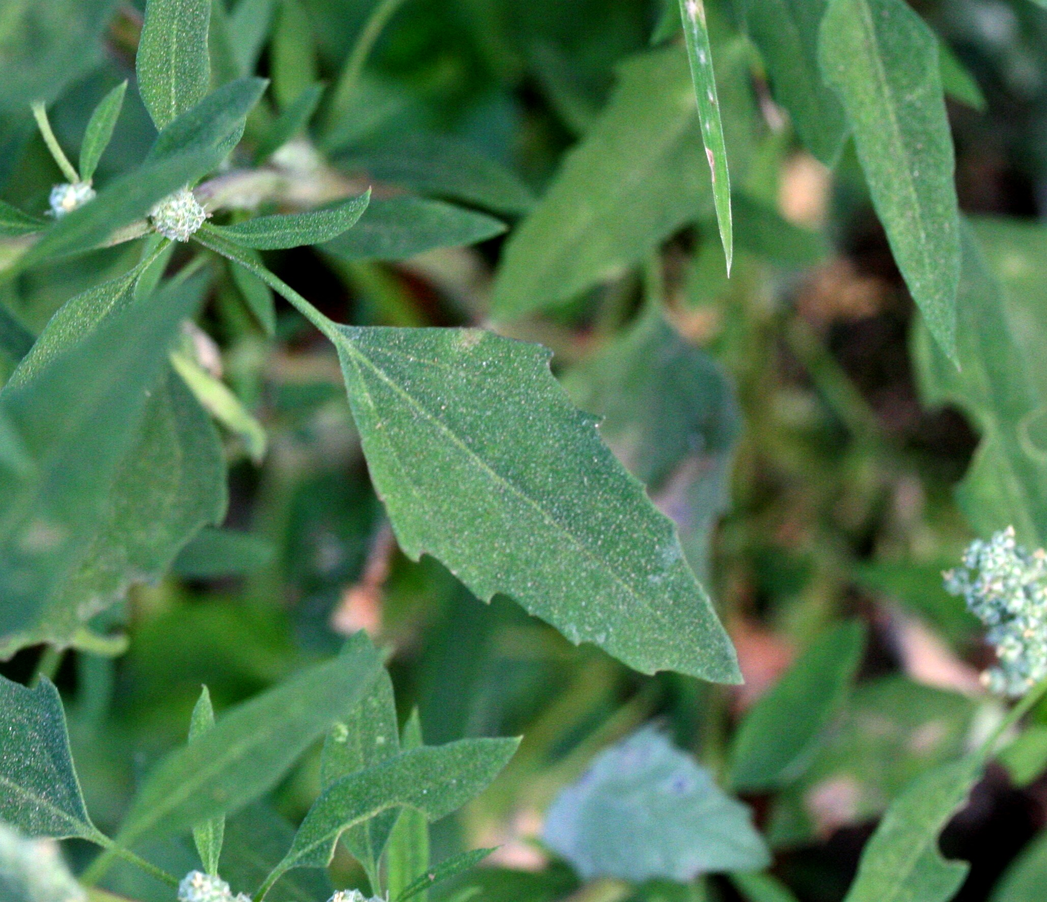 Farinello comune - Località : Cesa, Limana (BL), 330 m s.l.m.